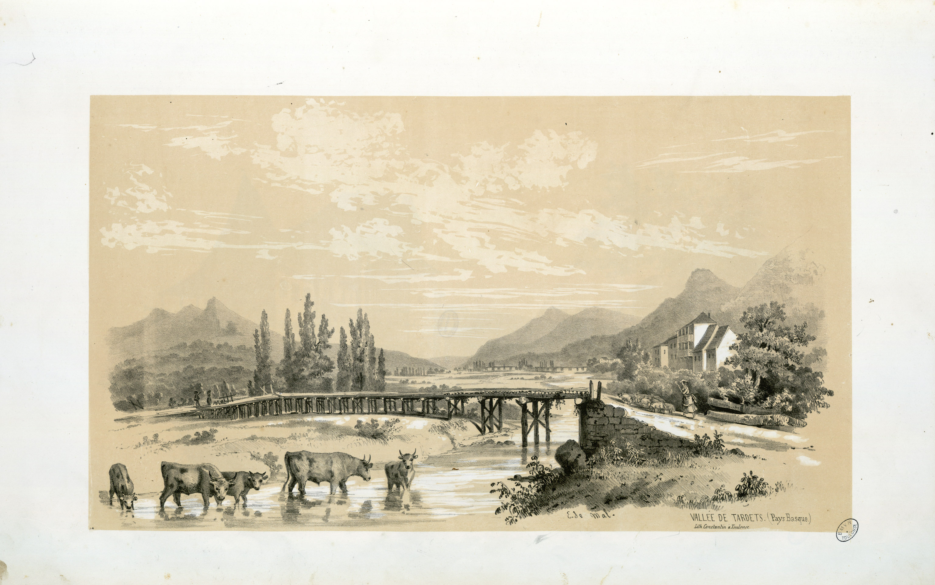 Fait partie d'un recueil de 15 planches lithographiées en camaïeu avec titre lithographié Ancely, René (1876 - 1966). Possesseur